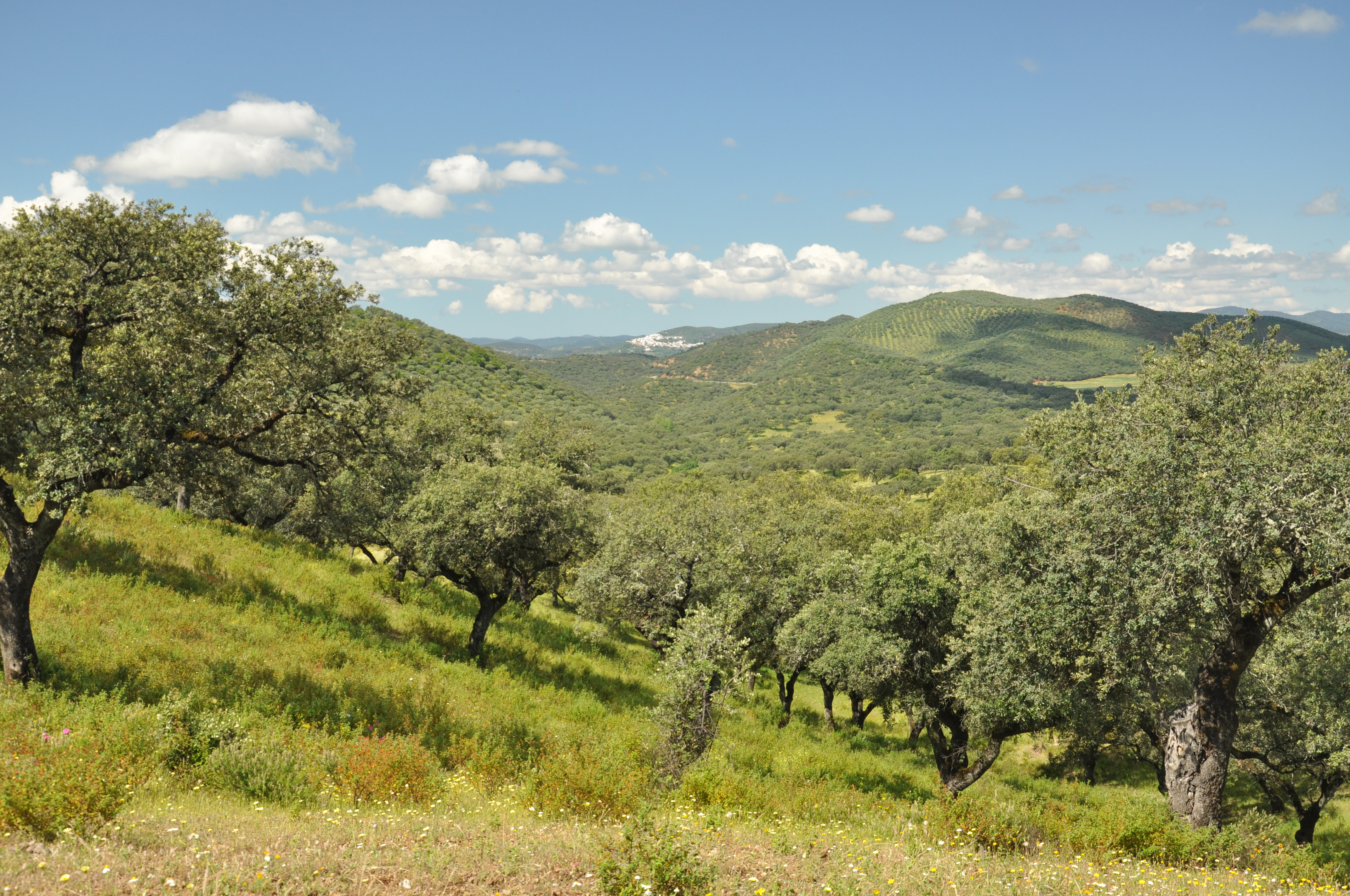 Zufre desde la Dehesa San Francisco en la Sierra de Aracena y Picos de Aroche, Santa Olalla del Cala, Fundación Monte Mediterráneo This is a photography of a Site of Community Importance in Spain with the ID: ES0000051. Natura2000 entry, EEA entry